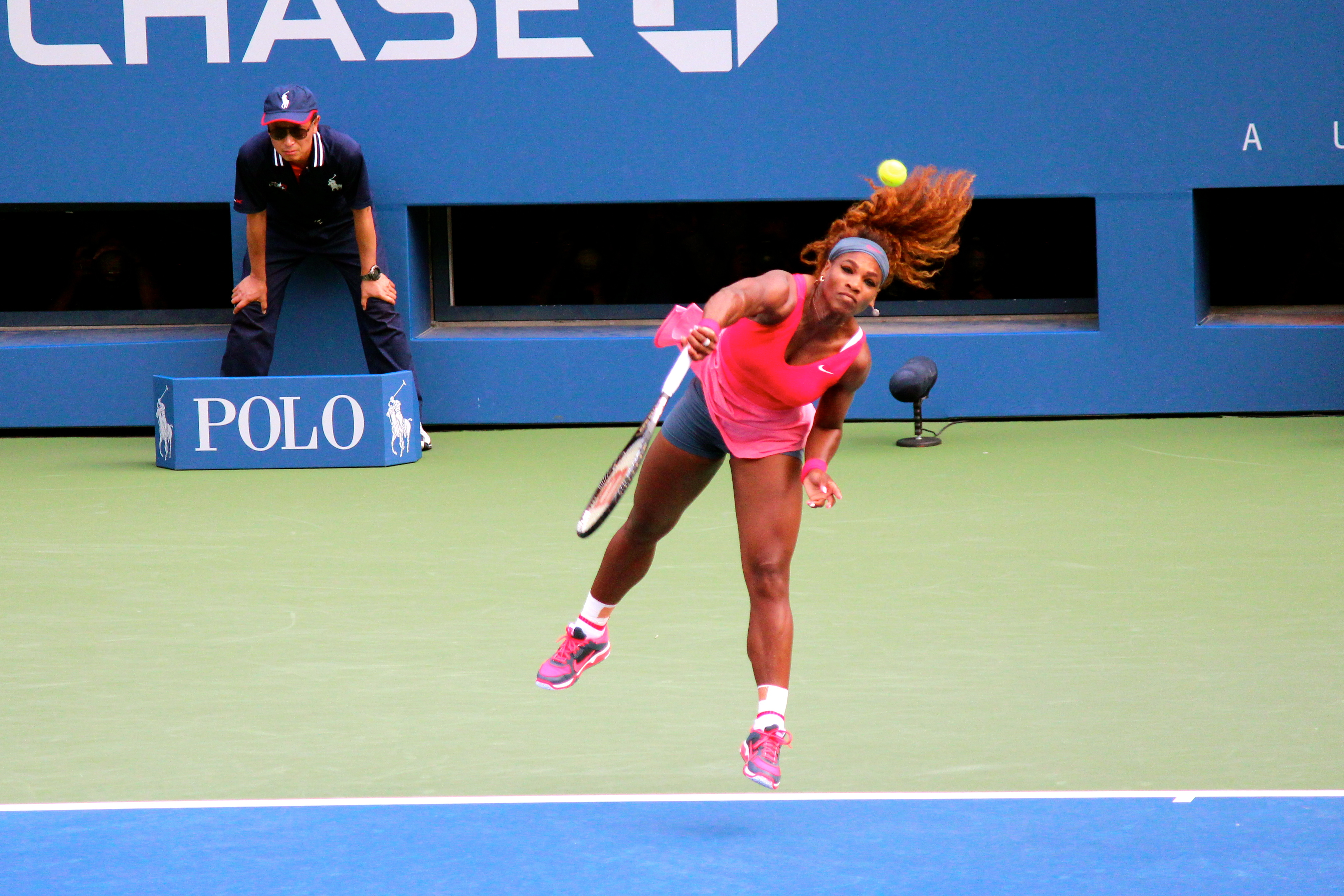 Serena Williams versus Sloane Stephens